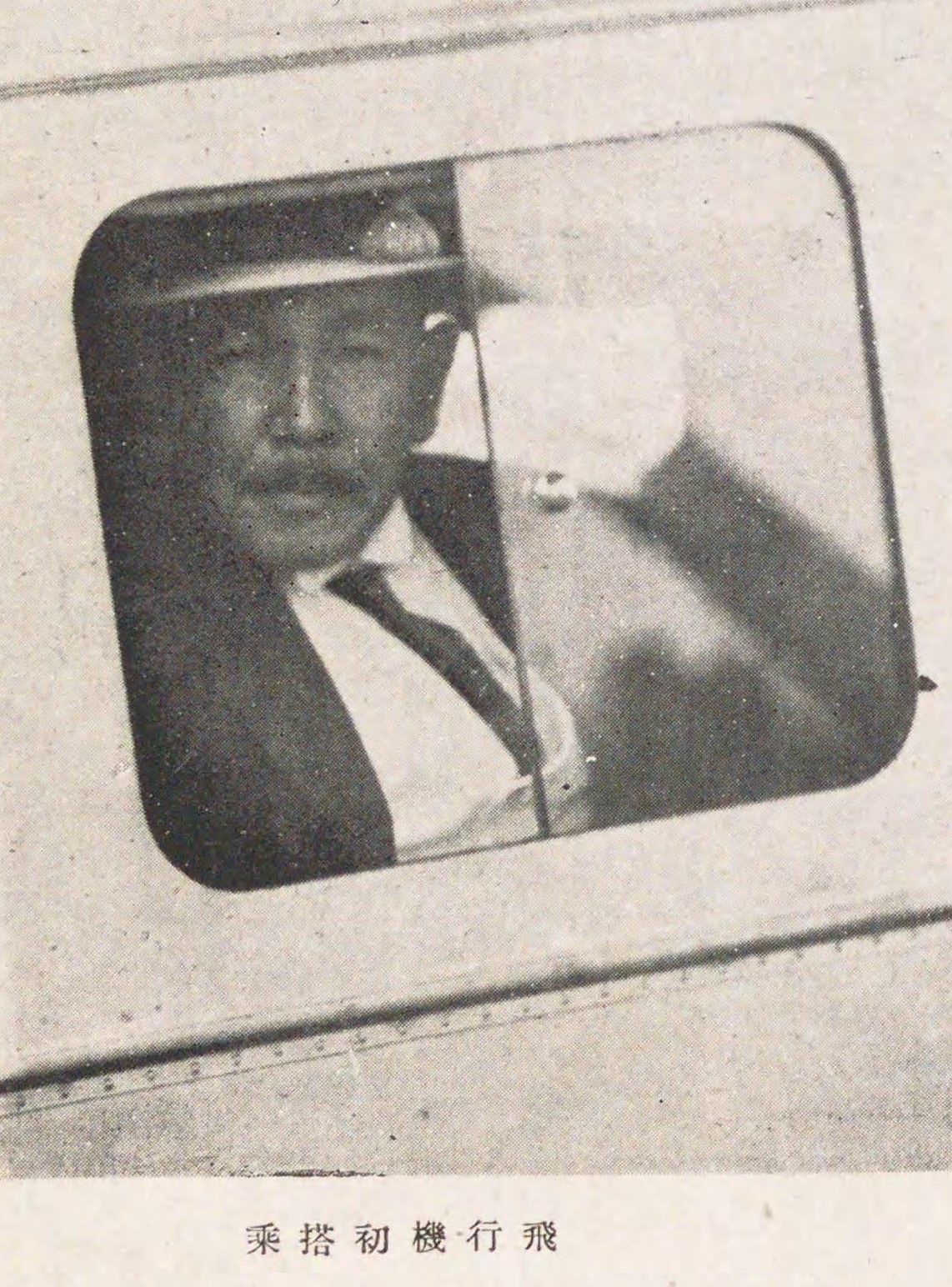 飛行機に乗る望月圭介逓信大臣'1927年-1928年)